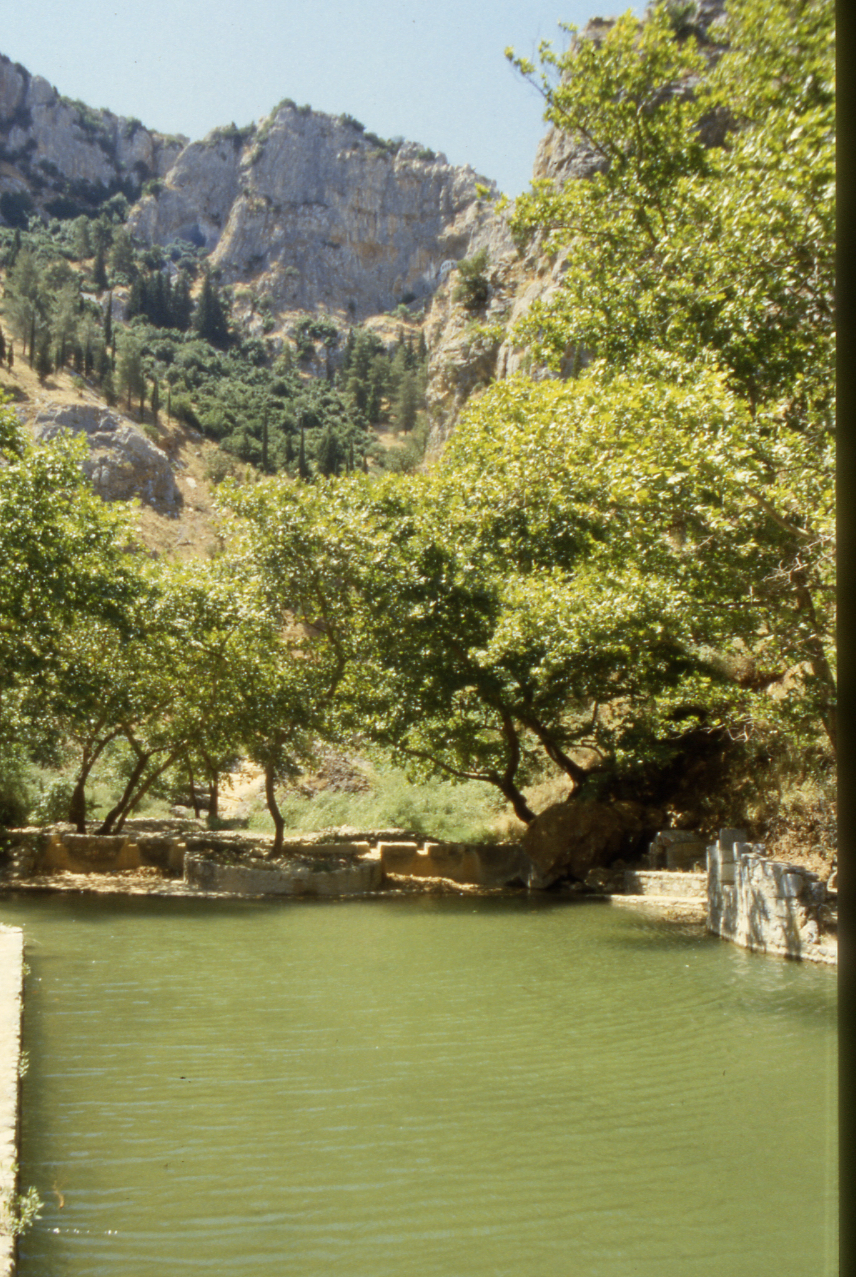 Livadia